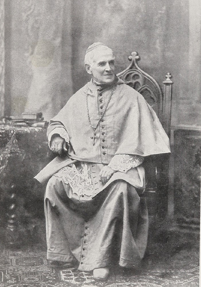 Monseñor Joaquín Larraín Gandarillas (Santiago, 13 de octubre de 1822 - ibídem, 26 de septiembre de 1897) fue un sacerdote católico chileno, obispo auxiliar de la arquidiócesis de Santiago de Chile y primer rector de la Pontificia Universidad Católica de Chile.